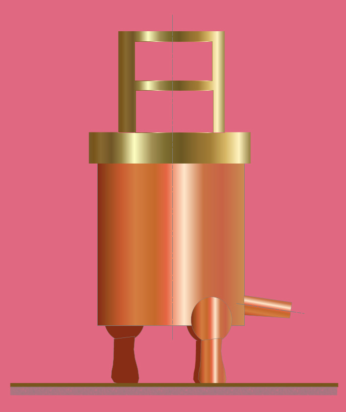 Clepsydre à écoulement chinoise (vers l'an -100).